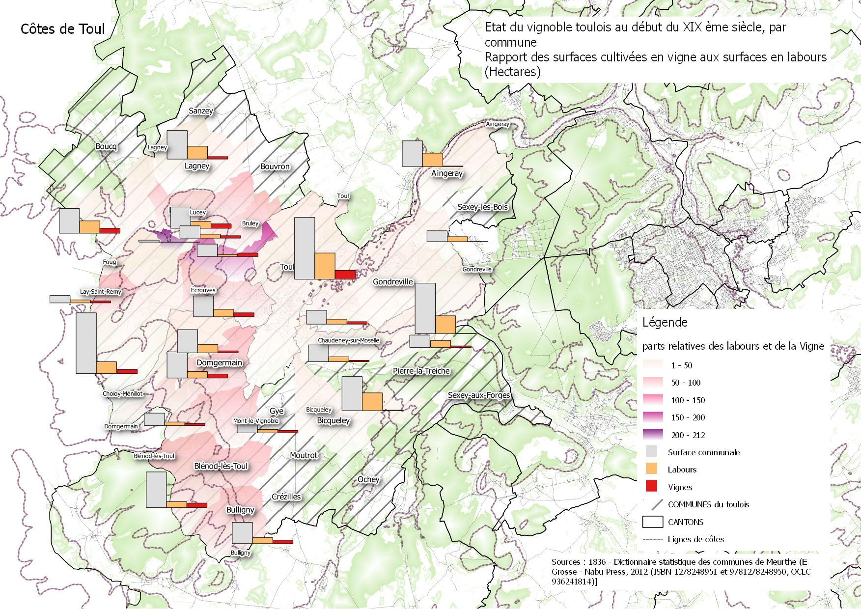 Etat du vignoble toulois au début du XIX ème siècle, par commune Rapport des surfaces cultivées en vigne aux surfaces en labours (Hectares)